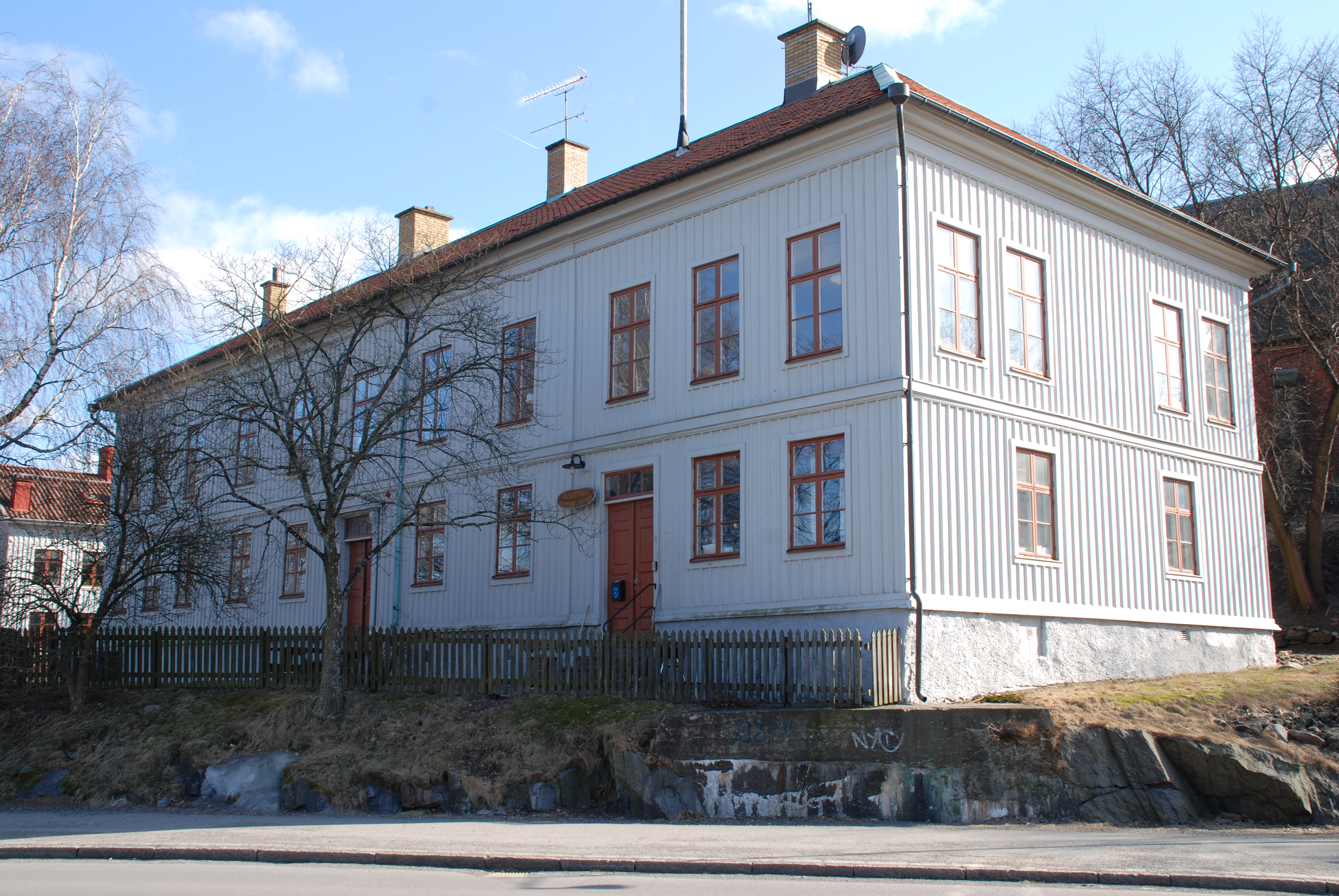 Klippans kulturreservat - Klippan 6 i Göteborg. Ostindiska kompaniets Corps de logie.